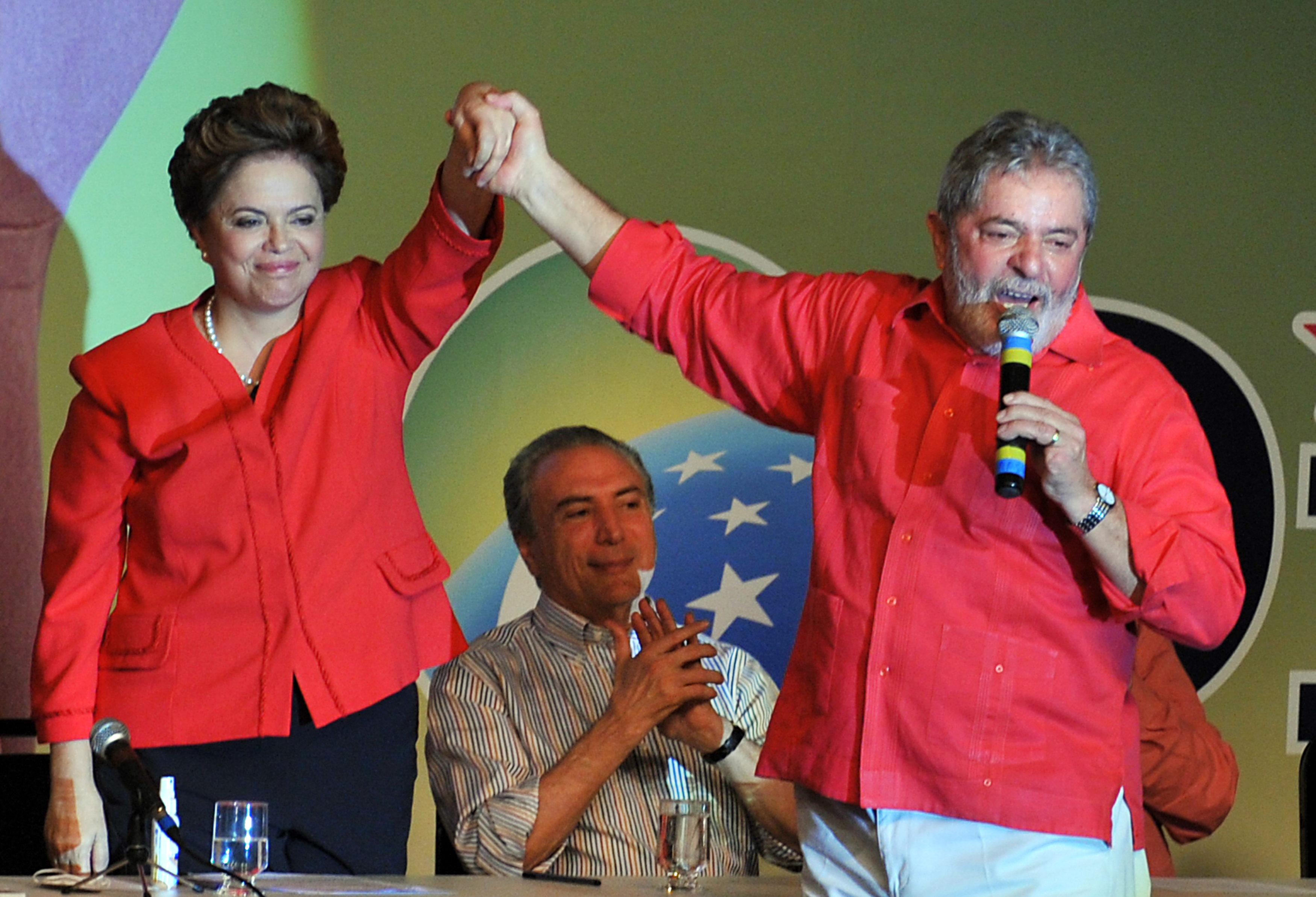 O presidente Lula participa da convenção nacional do PT, que confirmou a candidatura da ex-ministra Dilma Rousseff à Presidência da República e Michel Temer (PMDB) como vice na chapa.